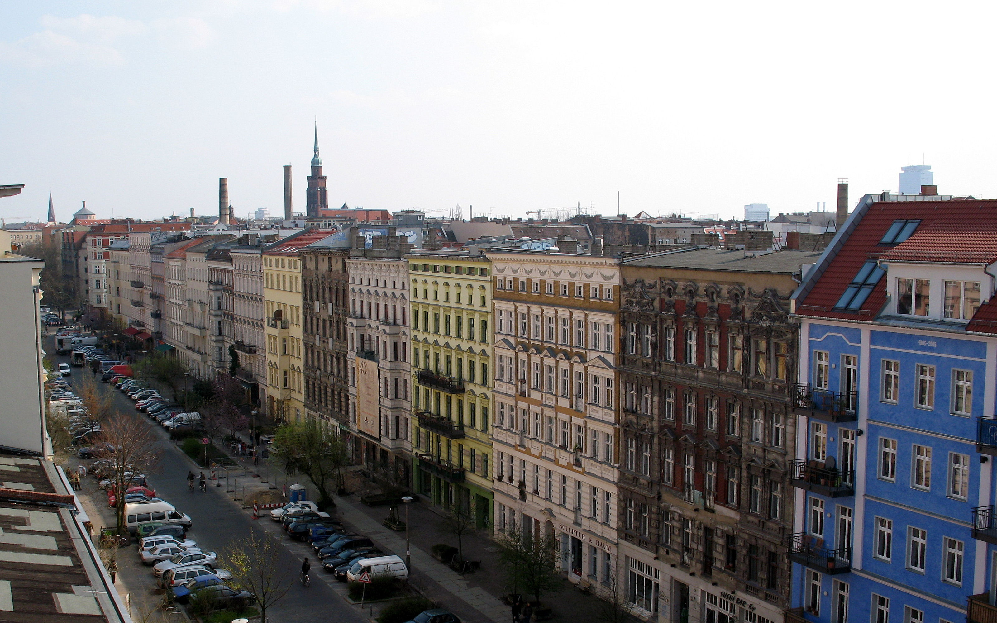 Oderberger Straße in Berlin, 31.03.2007